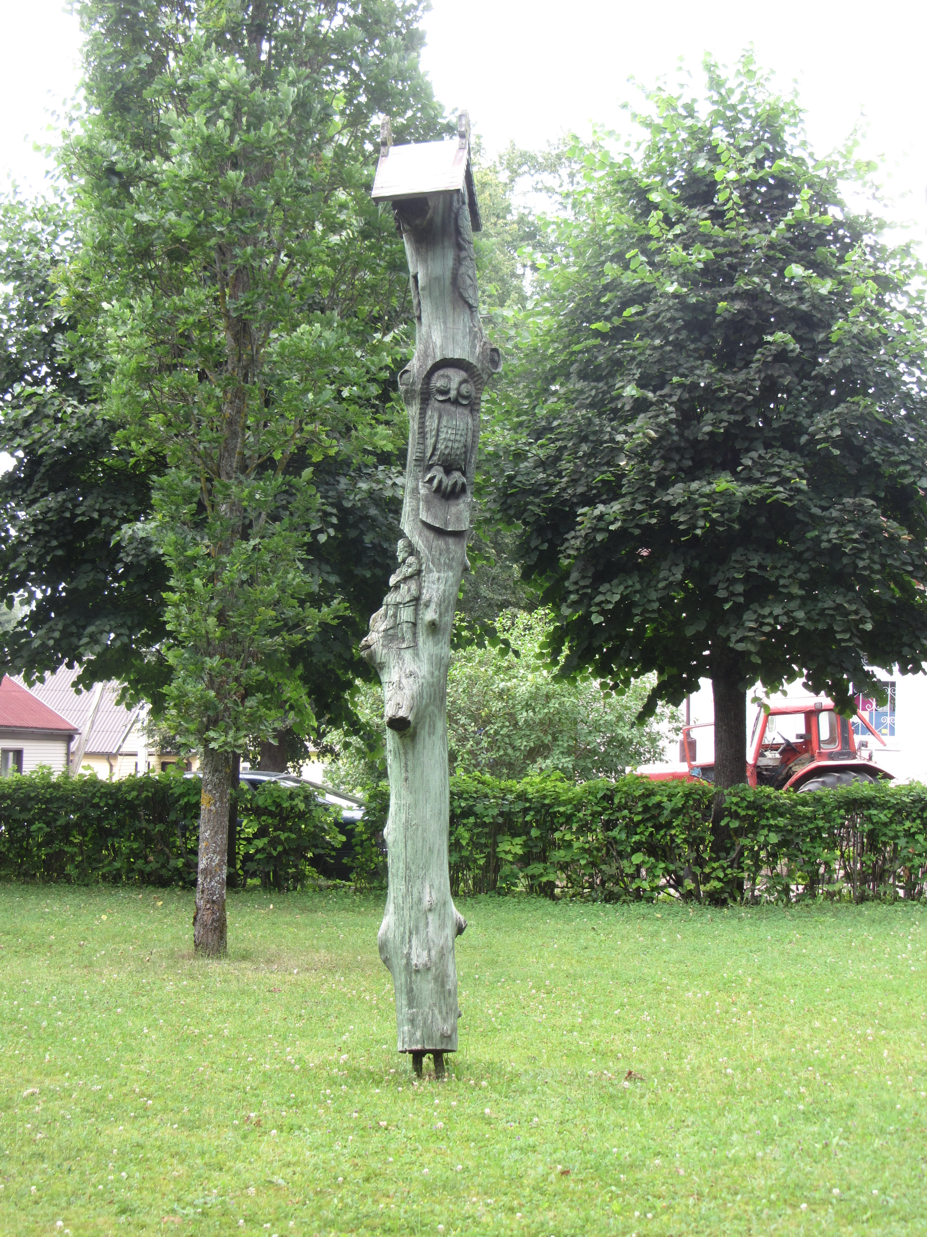 Antalieptė, Lithuania